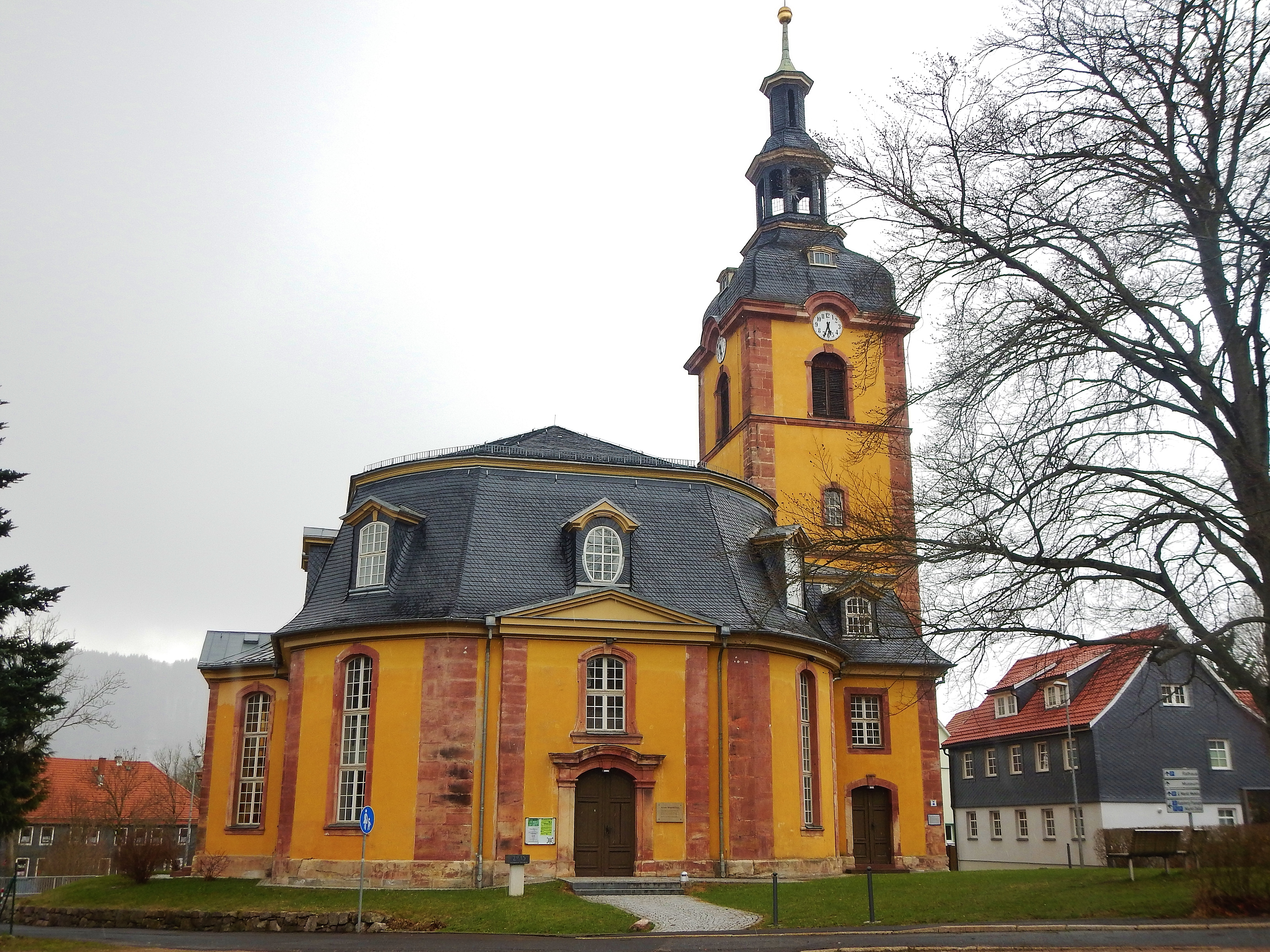 Evangelische Pfarrkirche Zella St. Blasii: 1768-1774, Johann David Weidner